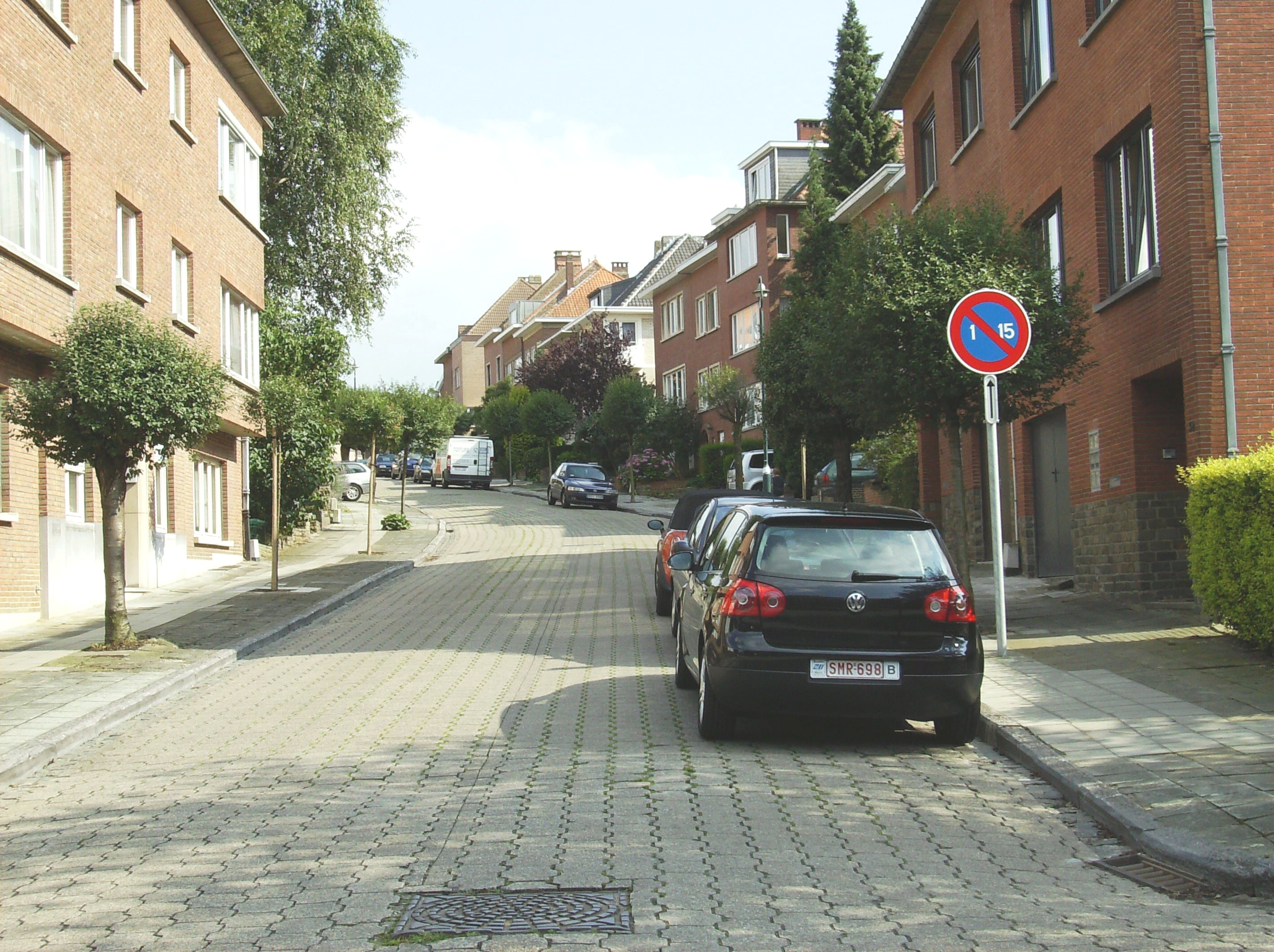 Avenue des Argus Auerghem Belgium